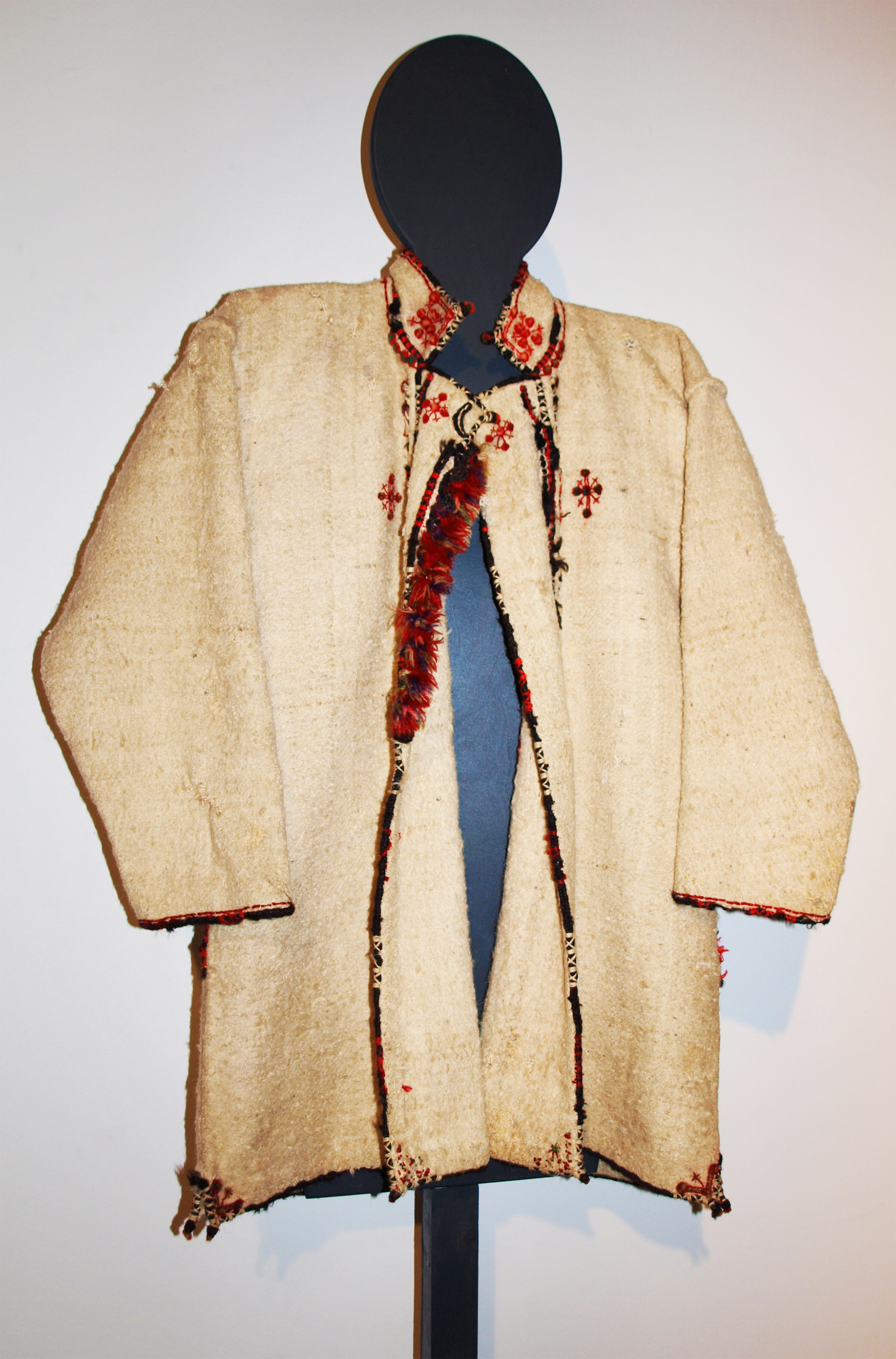 Гуцульське вбрання. Використовувалося на зйомках к/ф «Тіні забутих предків». Проект Мистецького Арсеналу «Тіні забутих предків. Виставка». Київ, 2016